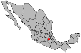 Locator map of Texcoco de Mora, México, Mexico